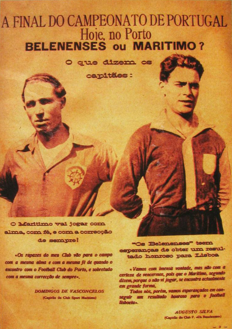 Notícia sobre a final do campeonato de Portugal de futebol entre o Club Sport Marítimo e o Belenenses. Eco dos Sports, grande revista sportiva semanal, Lisboa, Maio de 1926. A final decorreu a 6 de Junho de 1926. Colecção Club Sport Marítimo. Campo Almirante Reis, Funchal, ilha da Madeira.